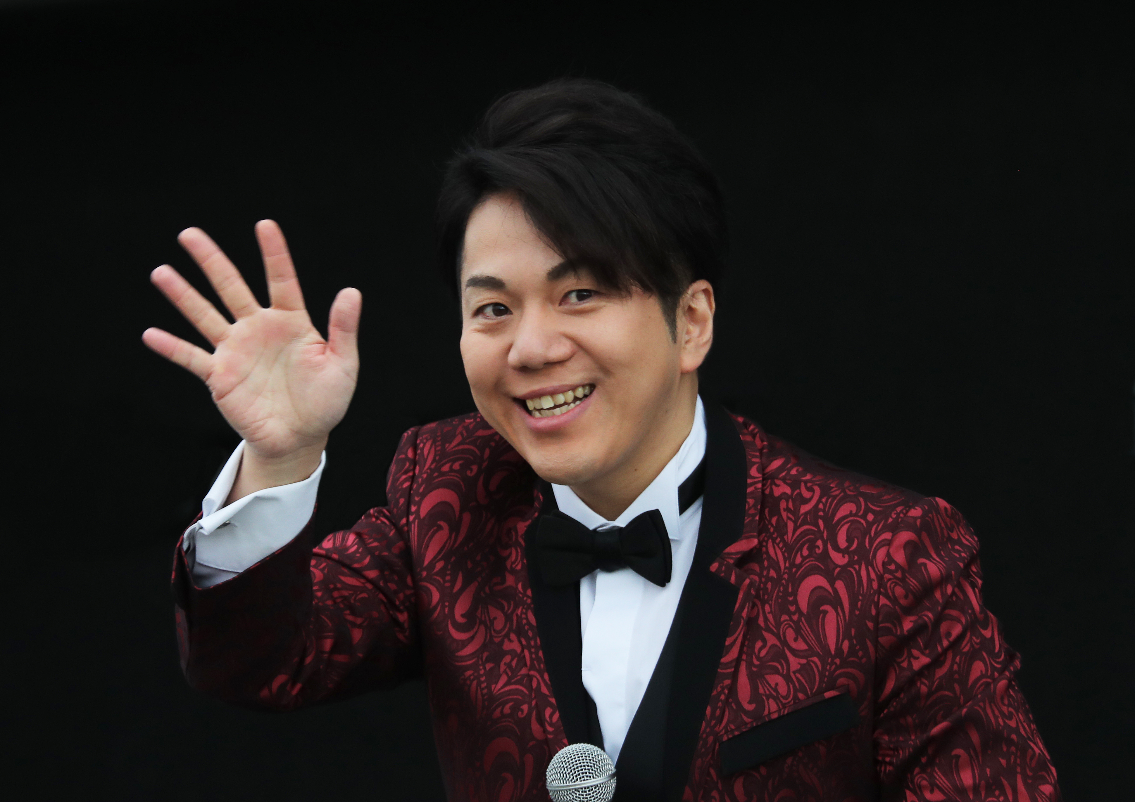 2018年10月28日門別ししゃも祭りにて